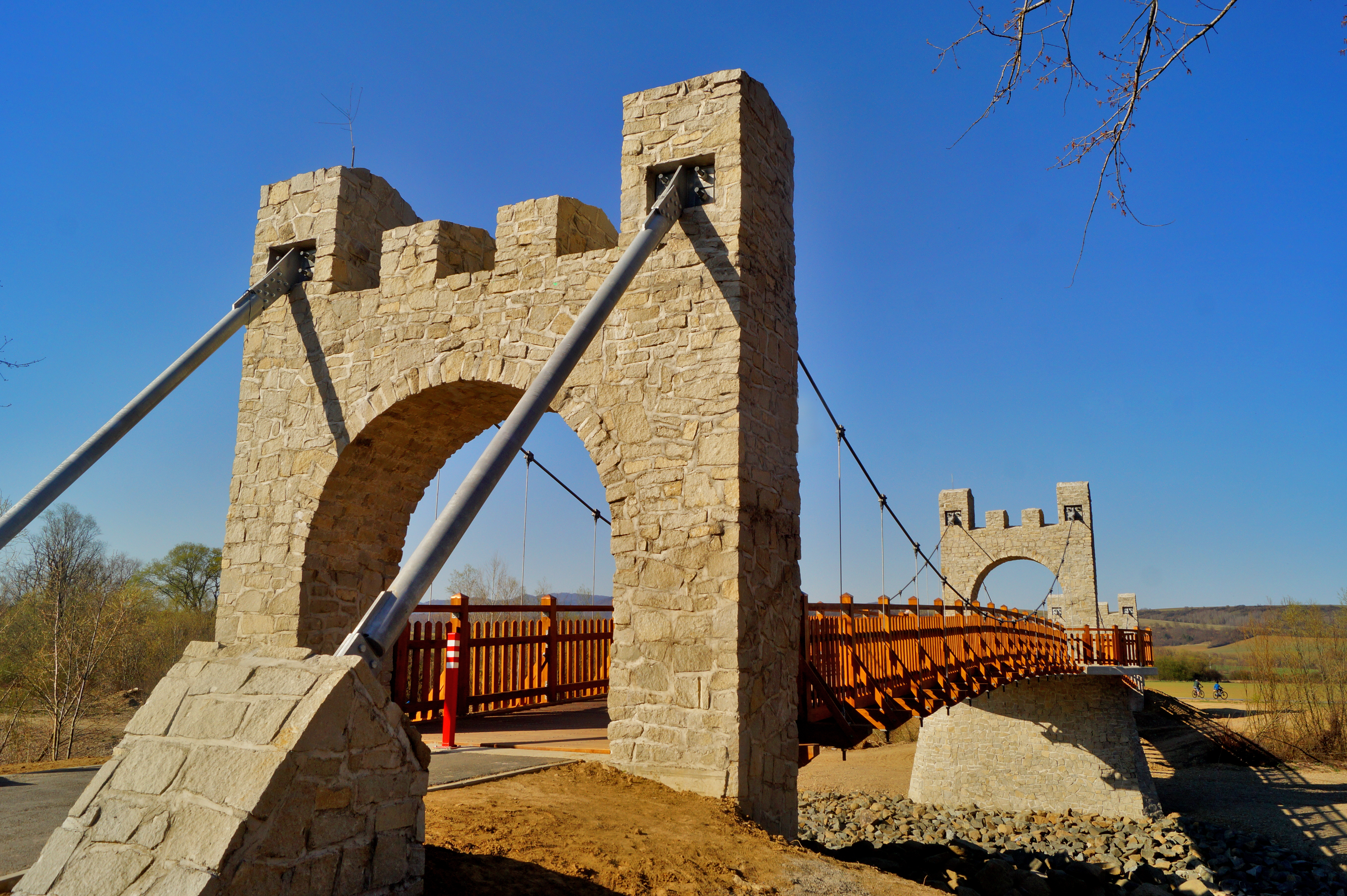 Cyklomost pod Šarišským hradom